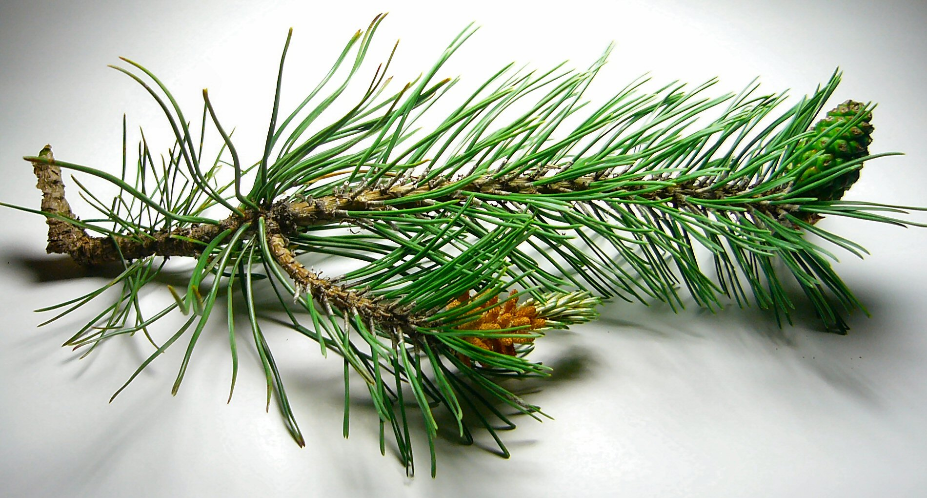 Conifer cones, Pinus contorta